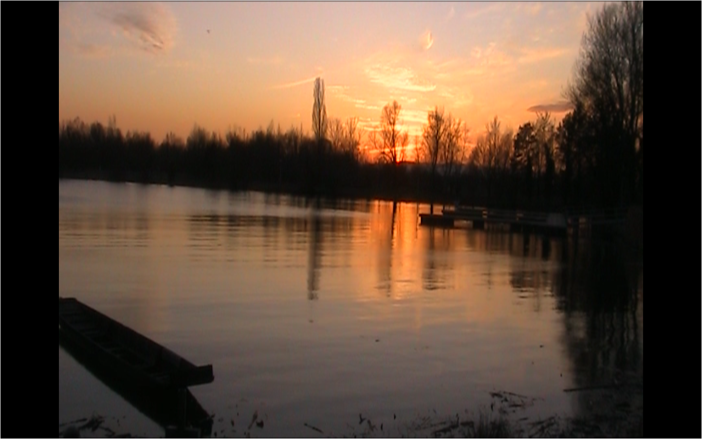 coucher de soleil sur le plan d'eau de plobsheim, objectif tourné vers les vosges